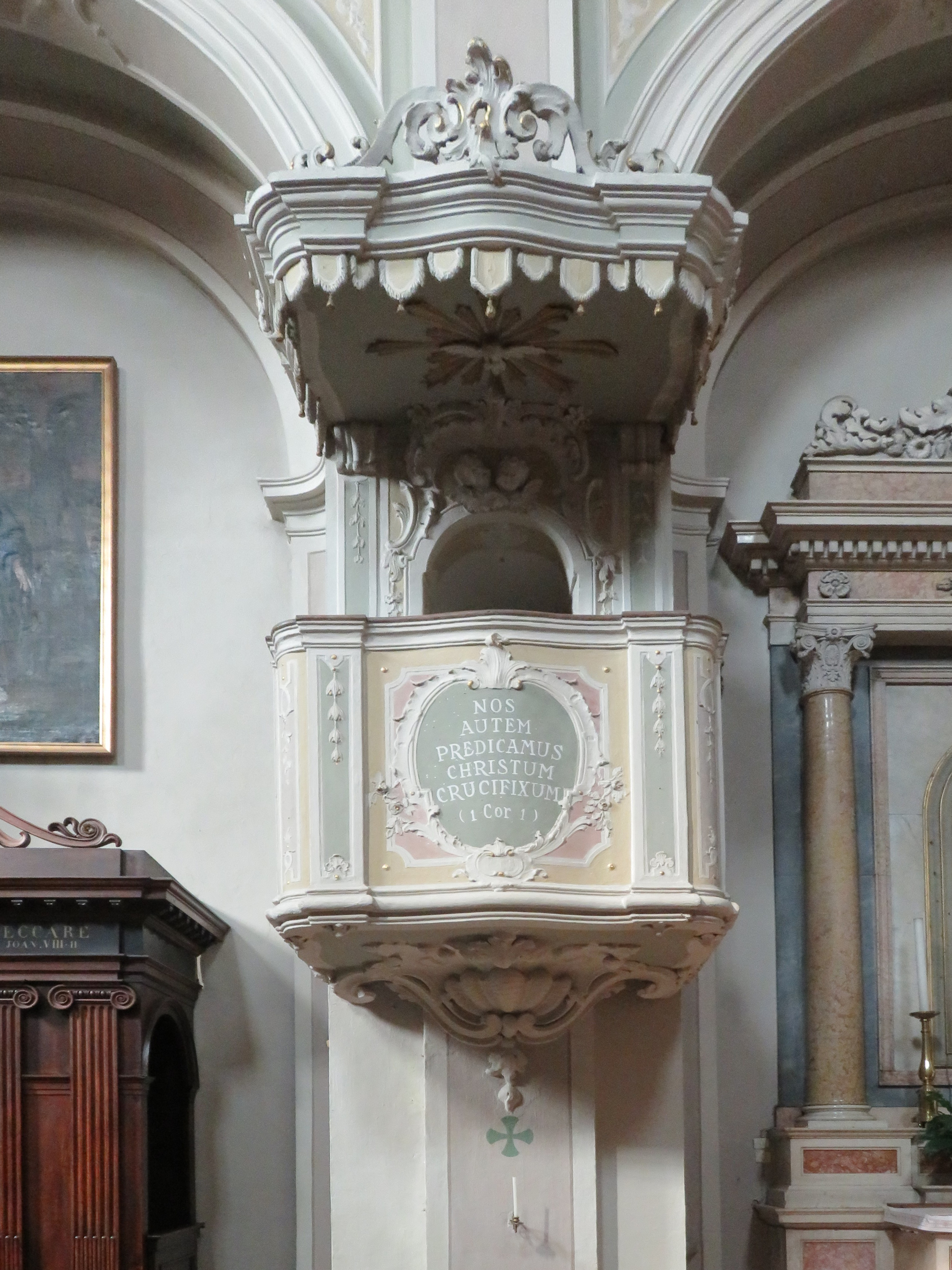 Chiesa di Loreto - Pulpito